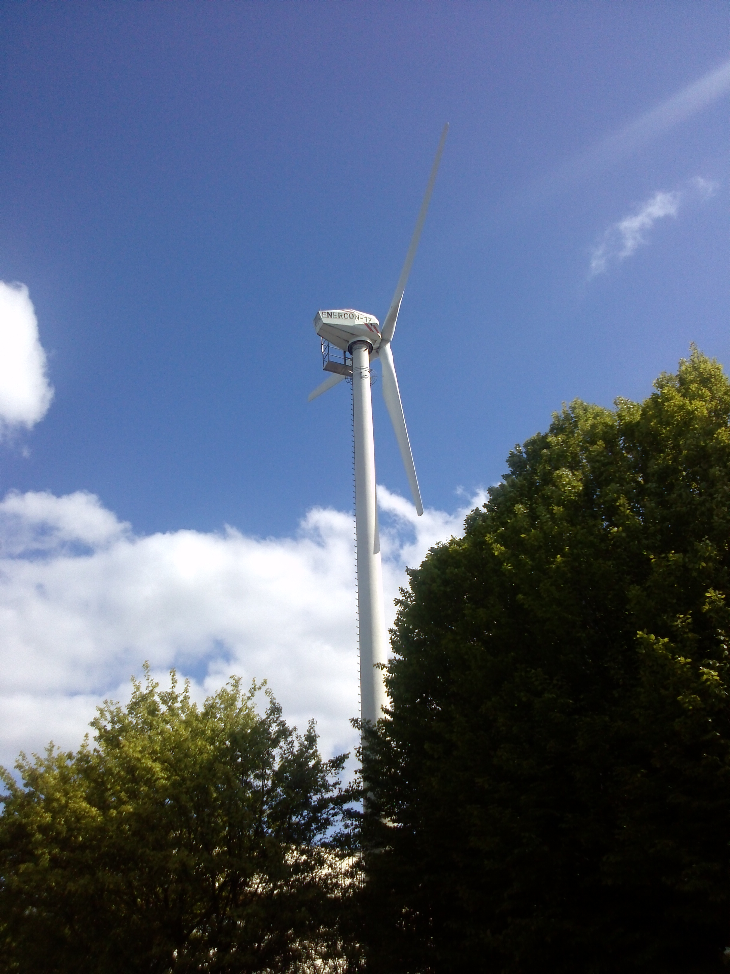 Windenergieanlage ENERCON - 17